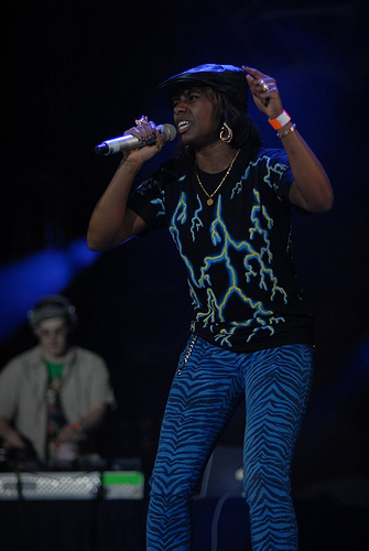 Santogold playing at Guadalajara, México